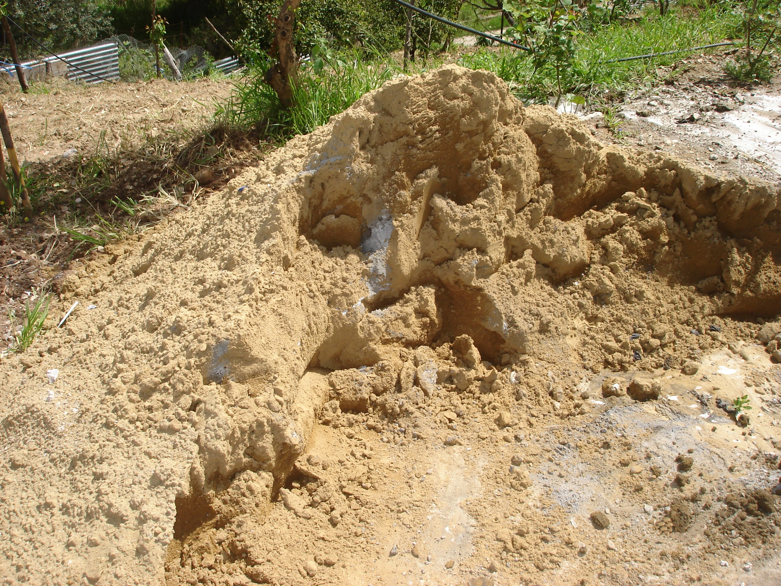 Άμμος Θαλάσσης-αμακονία